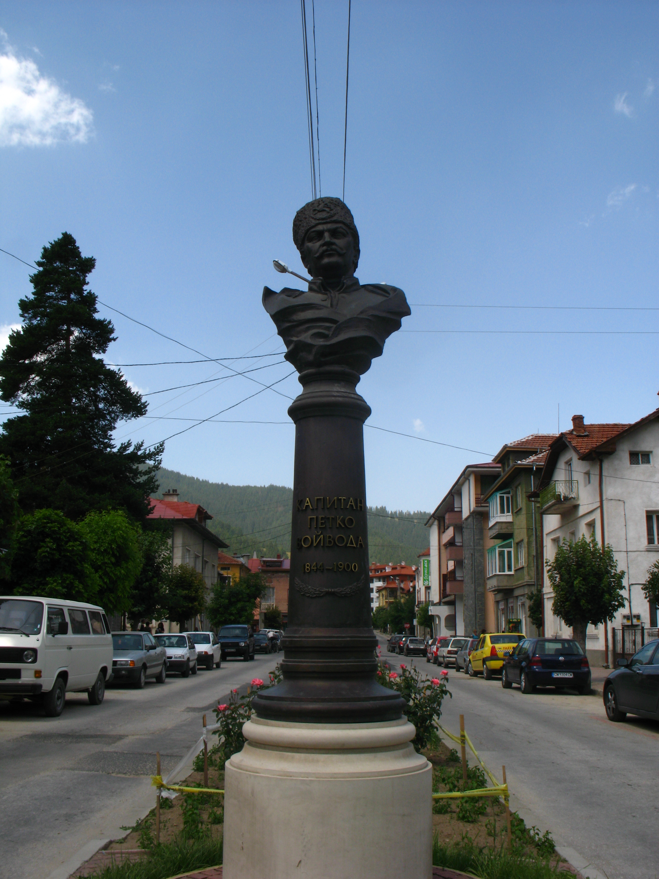 Паметник „Капитан Петко войвода“, Чепеларе